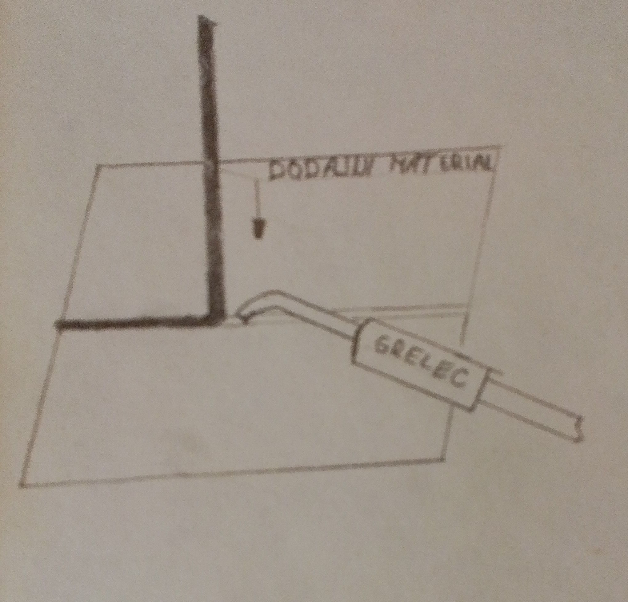 Varjenje dveh mehkih termoplastov z enim varkom